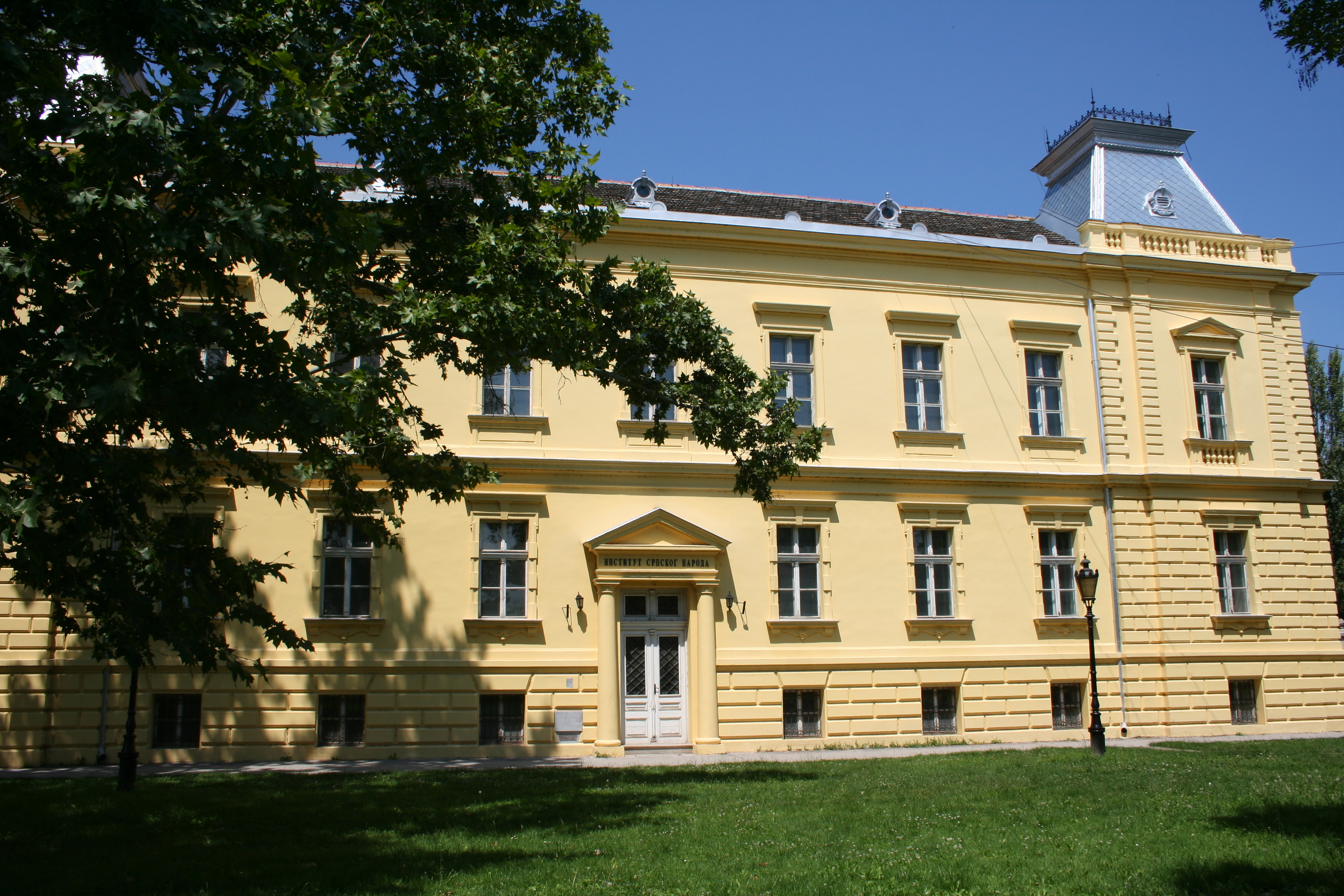 Zgrada Stefaneum